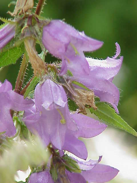 Species: Campanula grossekii Family: Campanulaceae Image No. 3